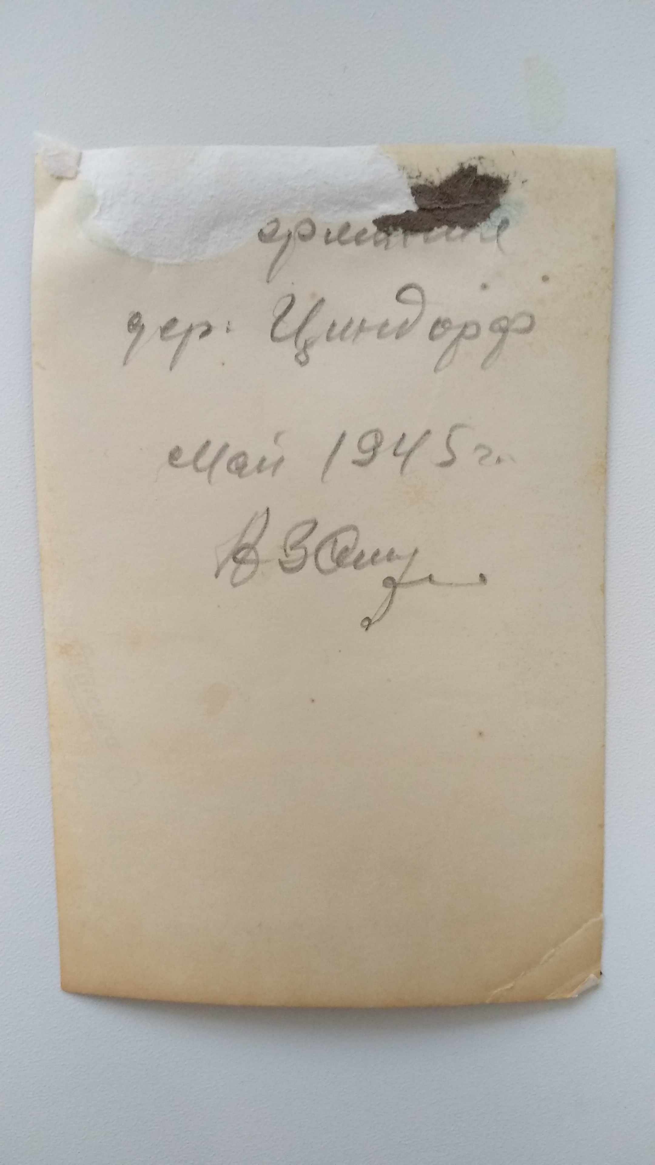 май 1945 гв. кап. 66 ГИА Замула А.П.- дер. Циндорф